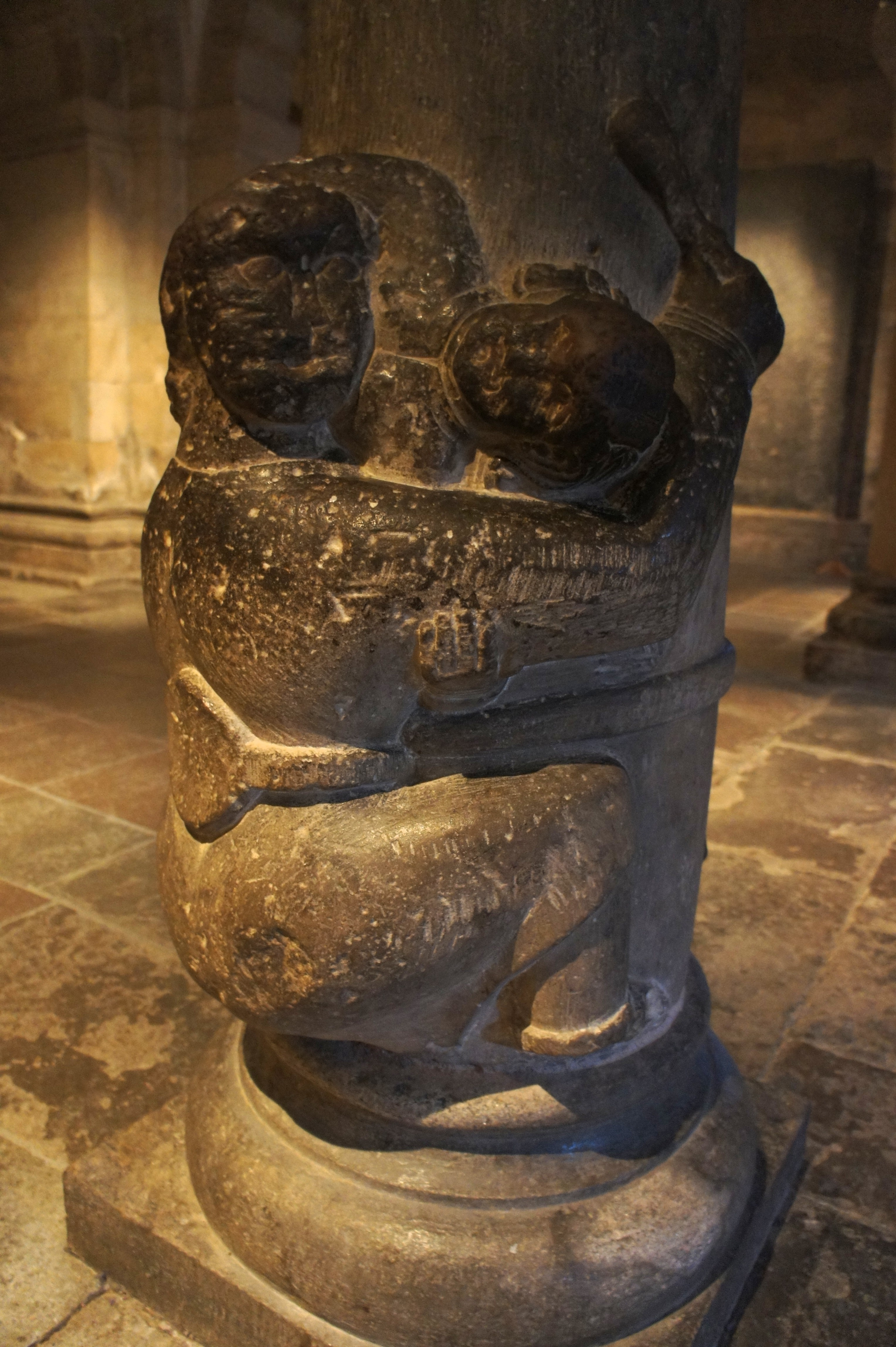 Figurer avbildade på en pelare av sten i kryptan i Lunds domkyrka.